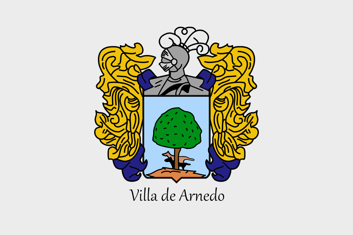 Bandera de Chancay